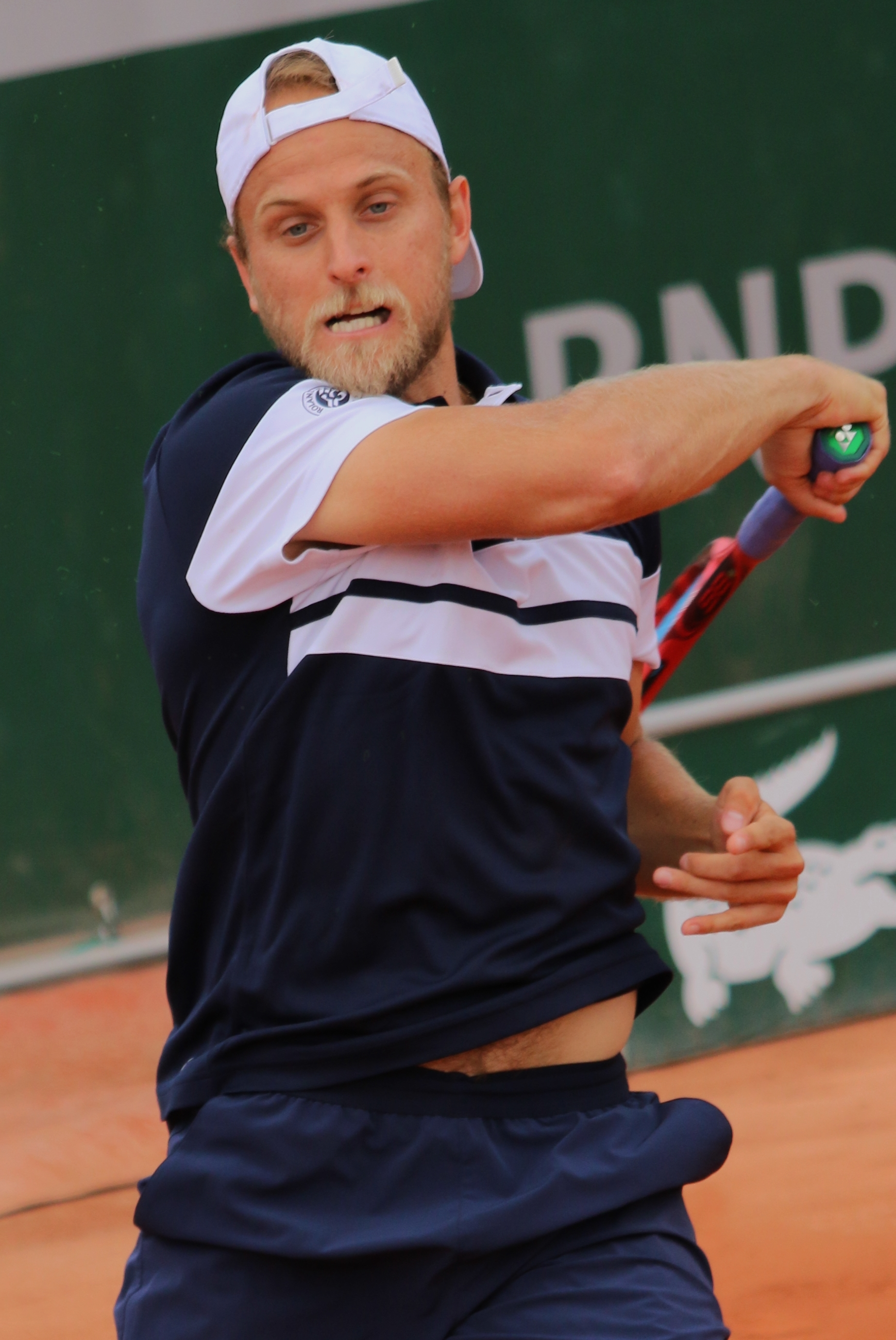 Kudla RG19 (18)